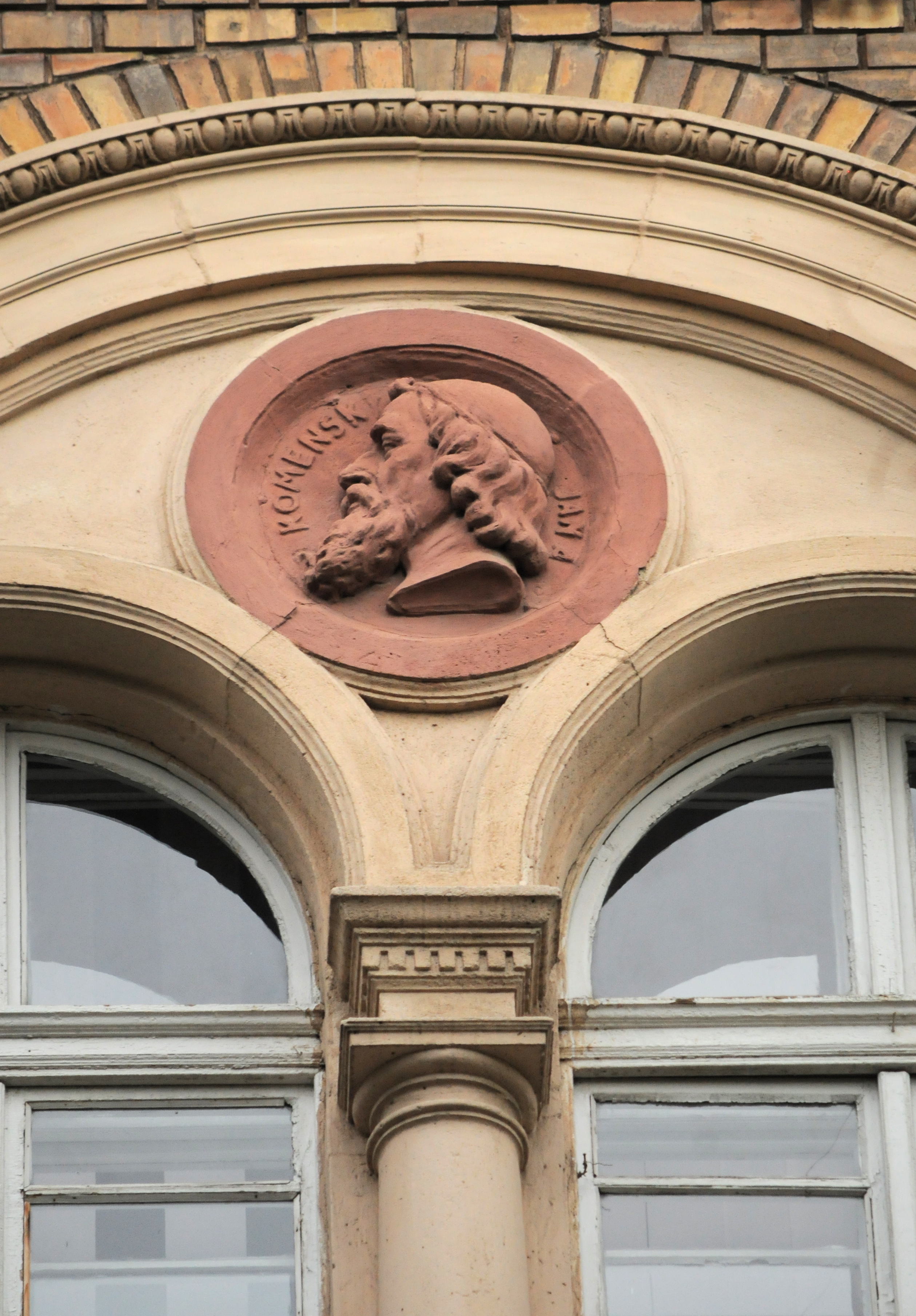 Будинок хімічного факультету УжНУ в якому був відкритий перший Закарпатський університет, медальон над вікнами 3-го поверху